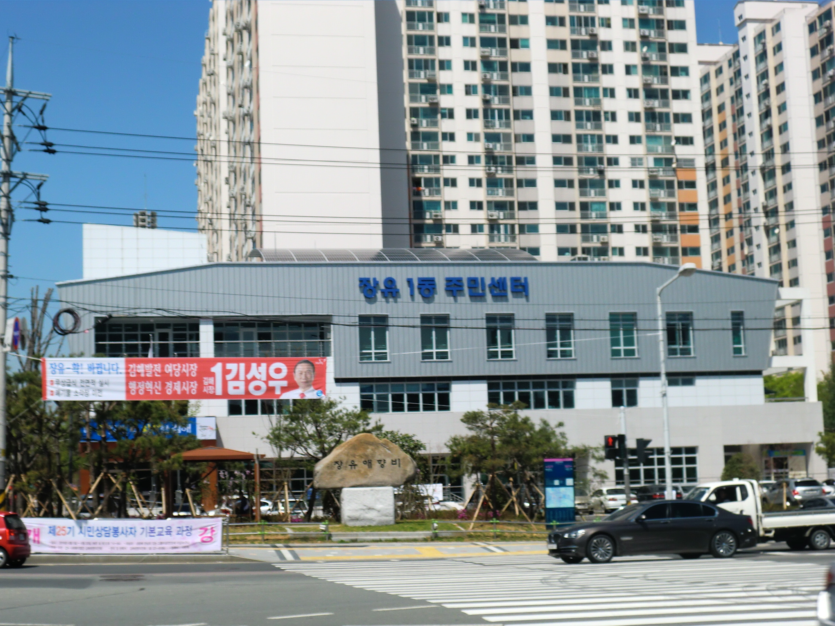 경상남도 김해시에 있는 장유1동 주민센터